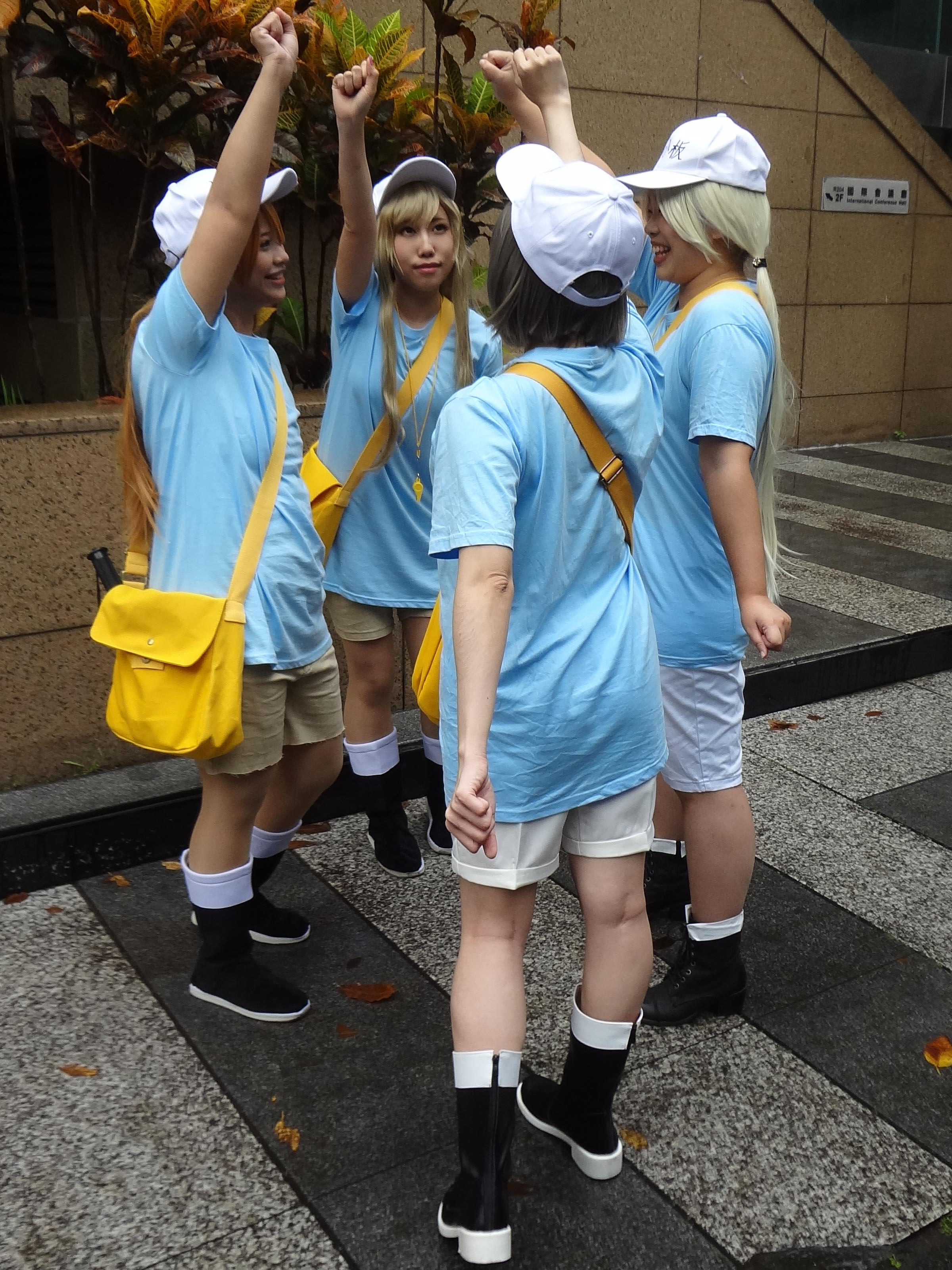 第50屆台灣同人誌販售會，《工作細胞》血小板cosplayer四人。